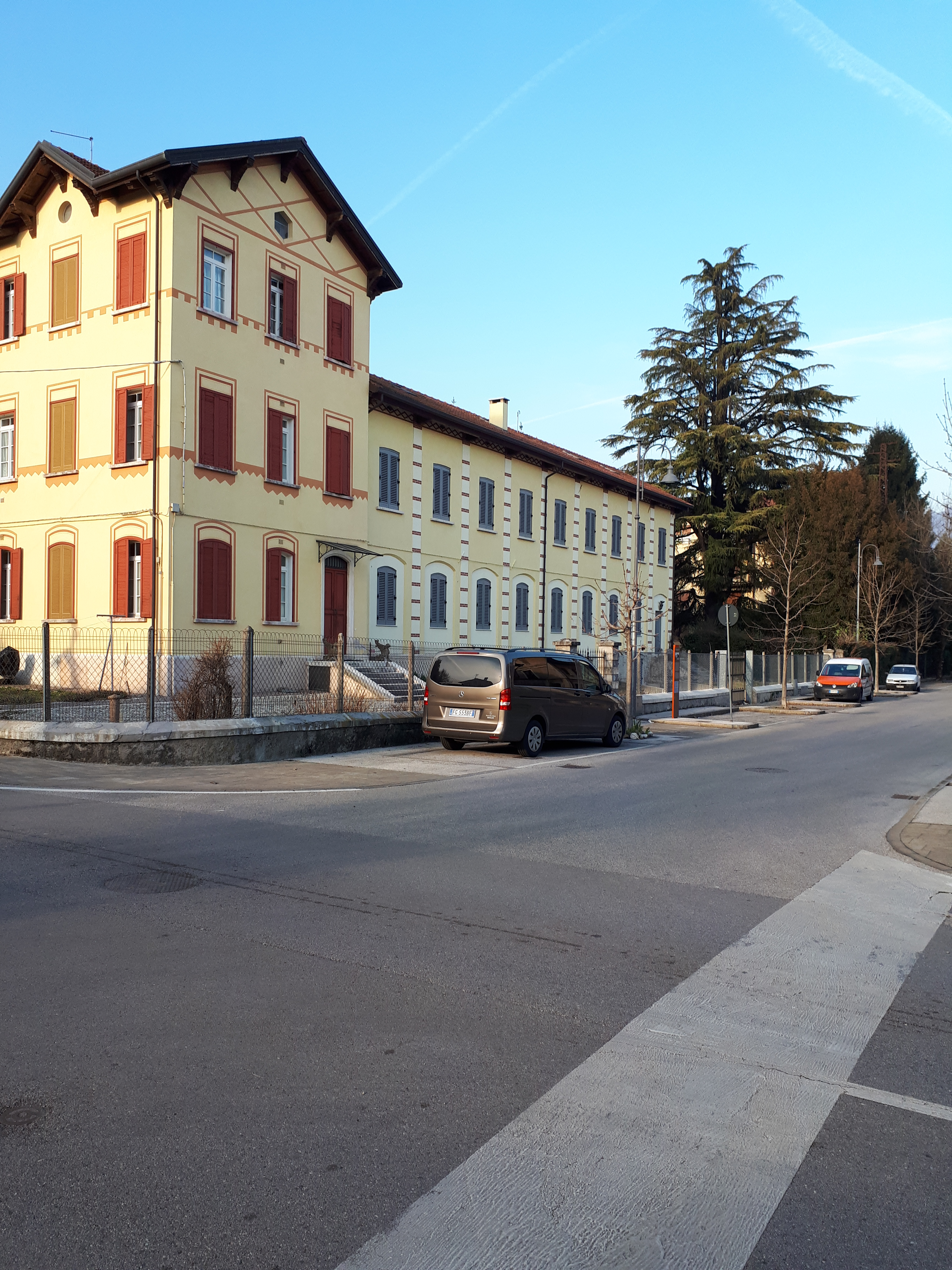 Scuola convitto di orticoltura e pomologia all'interno del quartiere, scorcio